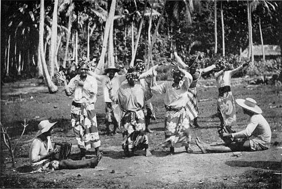 Tahitian training a ʻupaʻupa dance